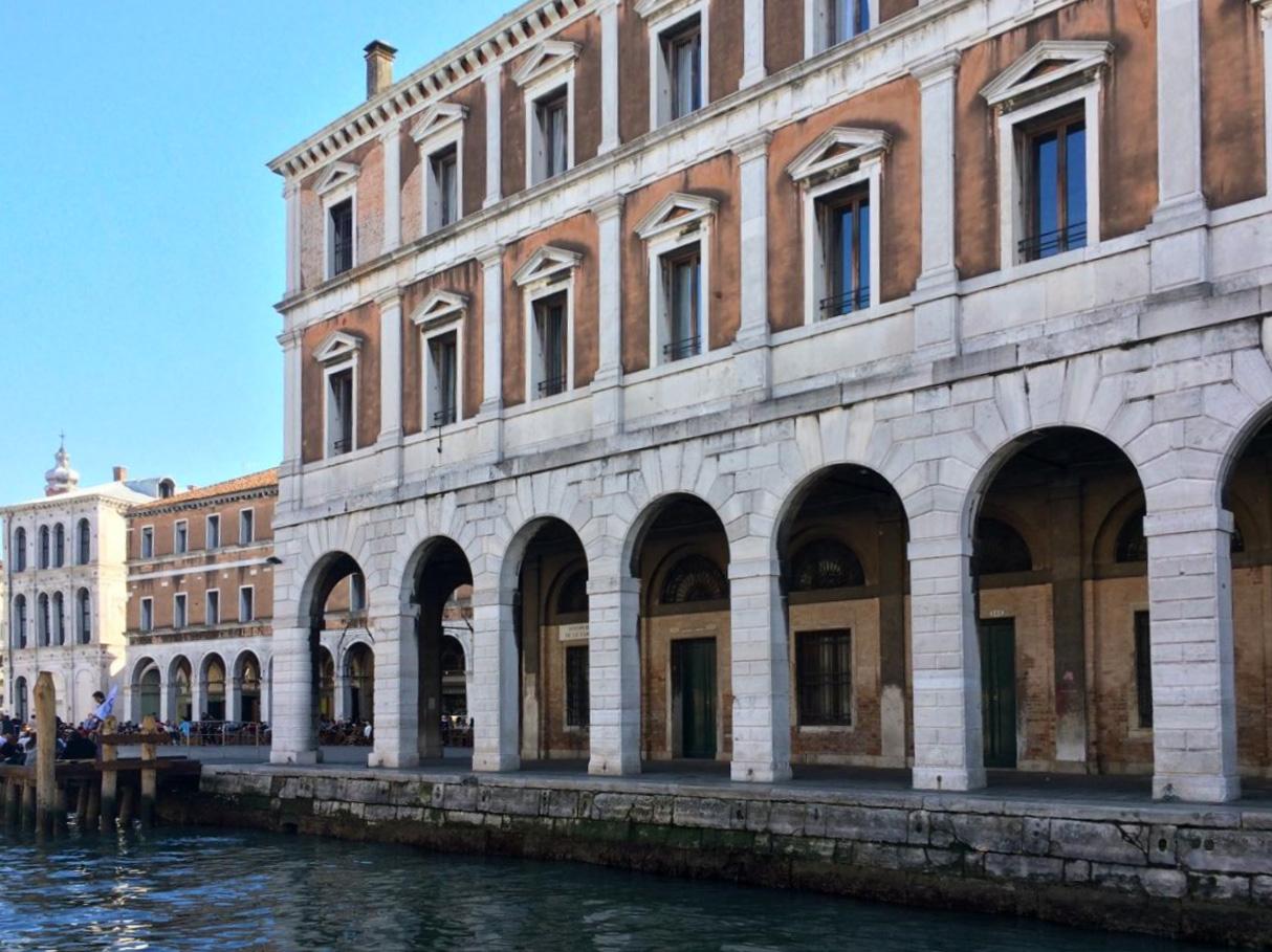 Fabbriche Nuove di Rialto - Fabbriche Nove di Rialto. Venice